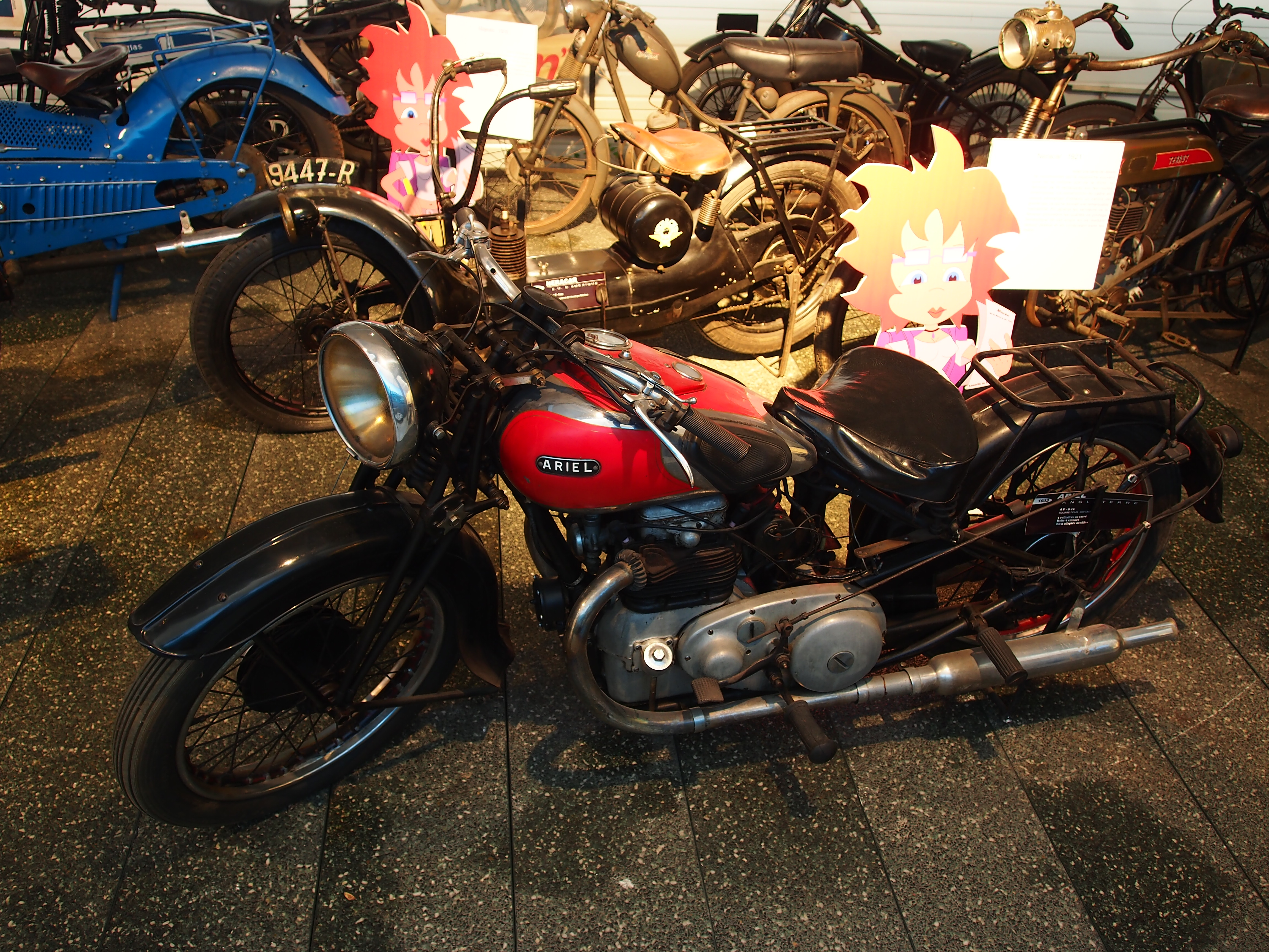 Photographed at the Musée de la Moto et du Vélo, Amneville, France.